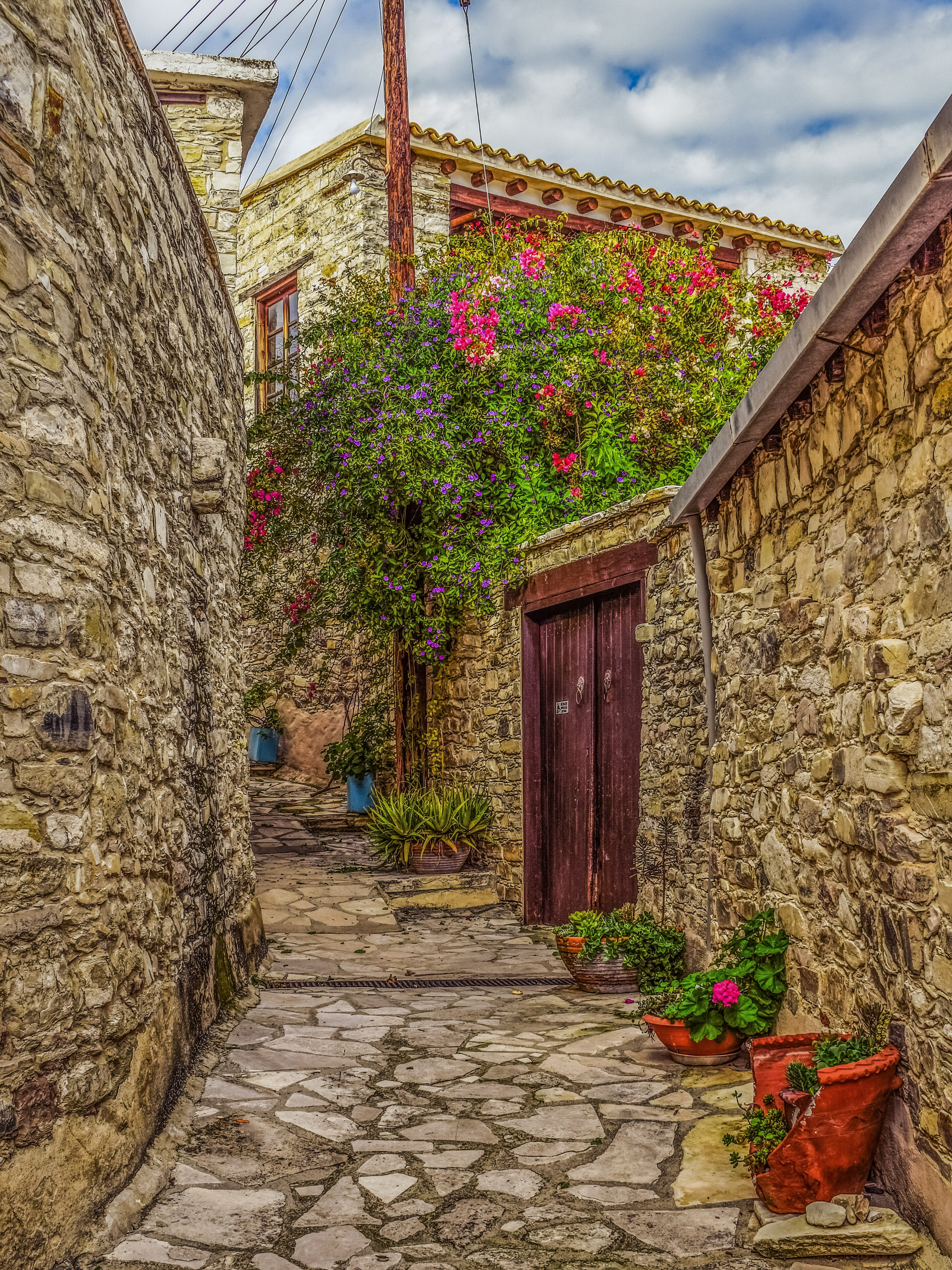 Вавла